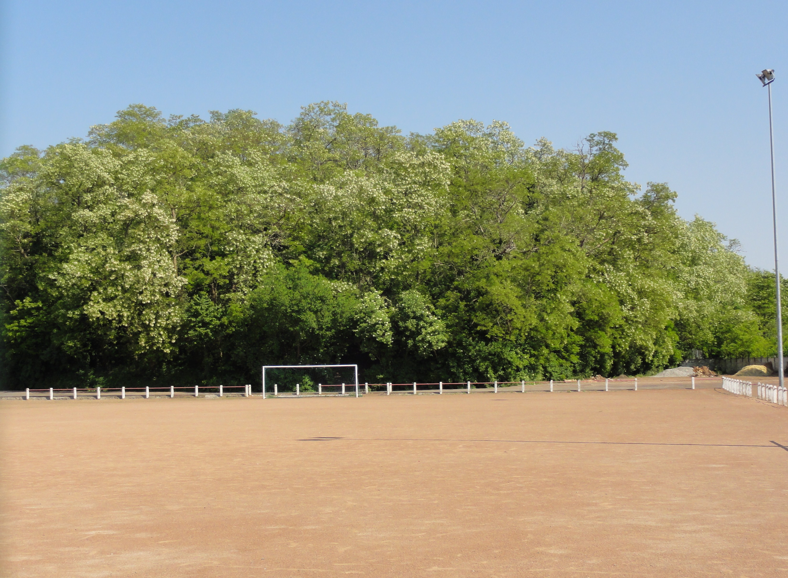 Terril n° 182 dit Bonnepart, Fosse Bonne Part de la Compagnie des mines d'Anzin, Fresnes-sur-Escaut, Nord, Nord-Pas-de-Calais, France.